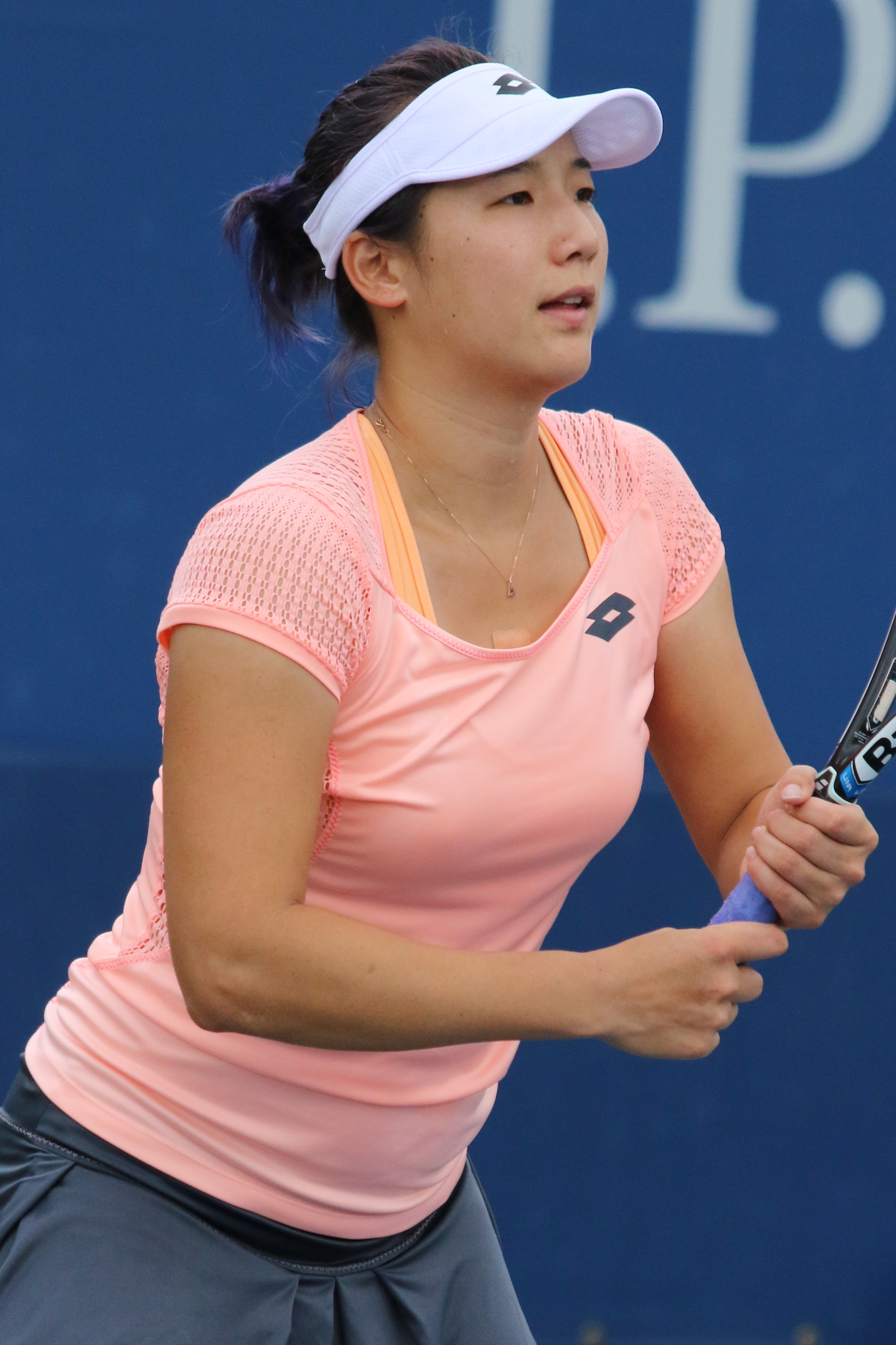 Zhang KL. US16 (20)